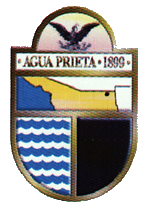 Escudo del municipio sonorense.